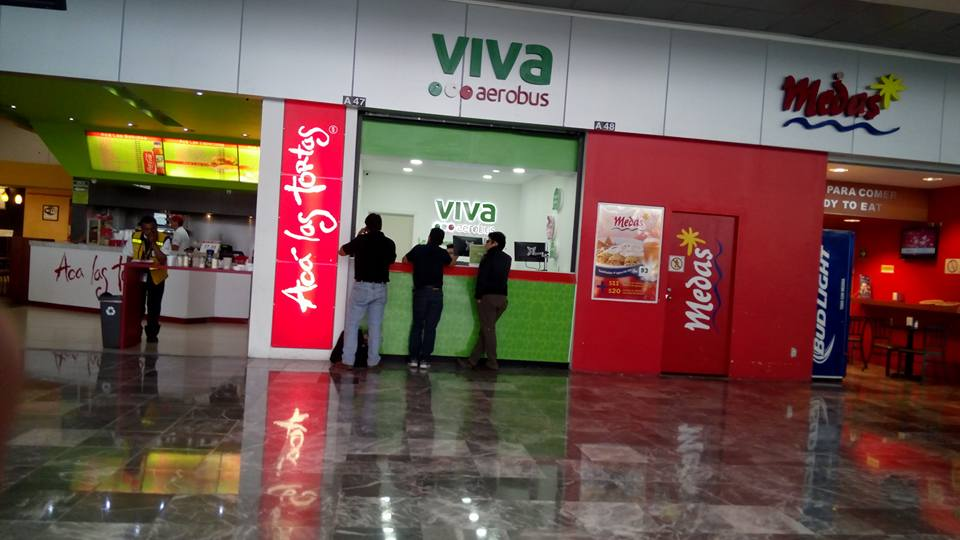 modulo de atención de la aerolínea en el aeropuerto de tijuana